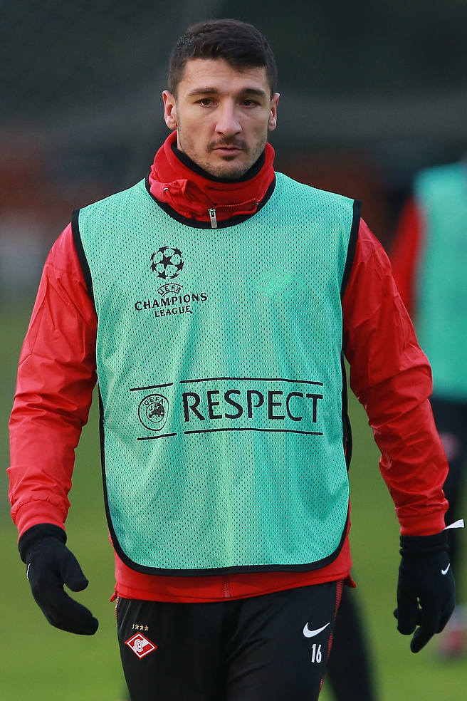 Тренировка «Спартака»